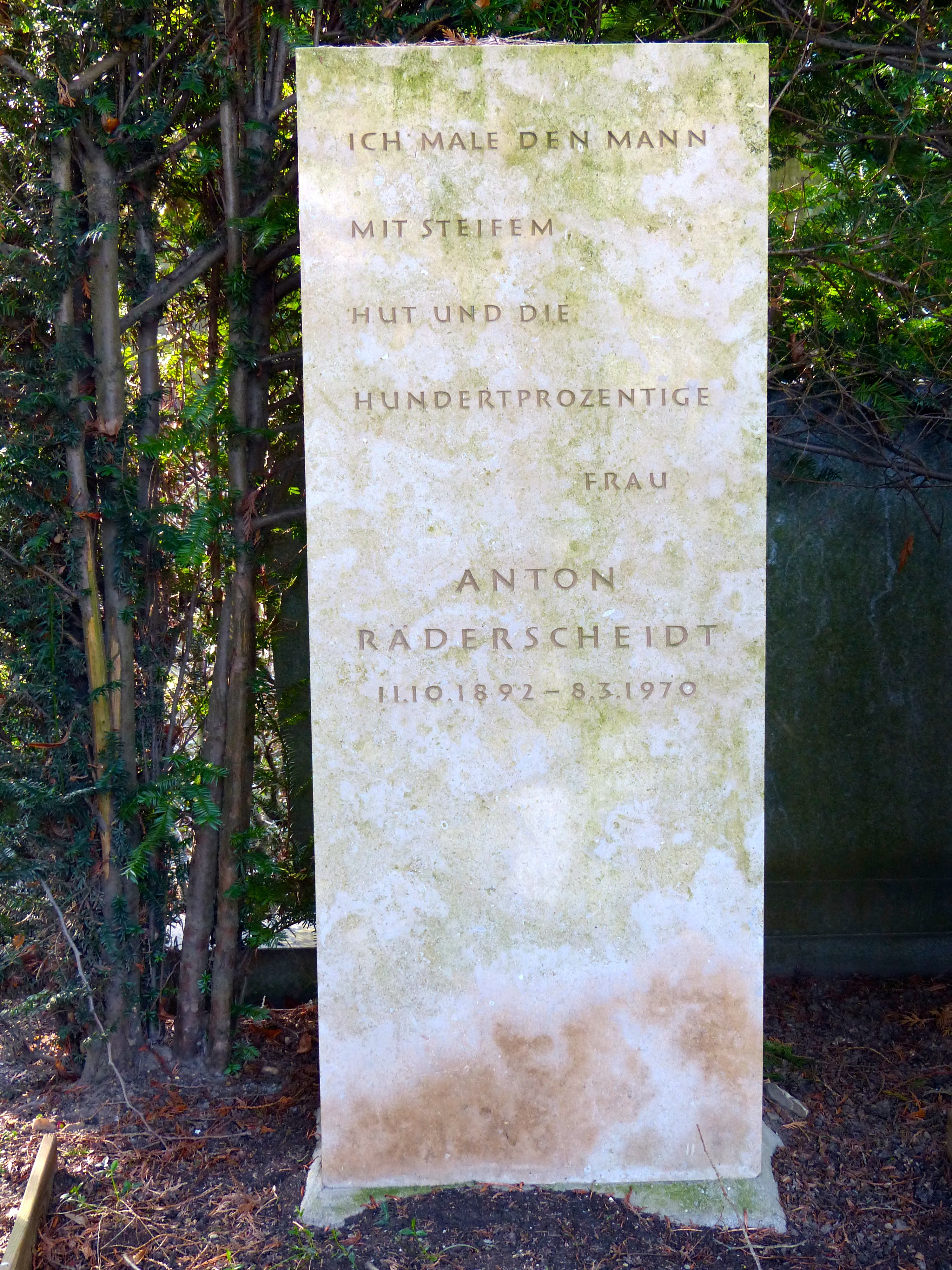 Grabstelle auf dem Melaten-Friedhof: Anton Räderscheidt (* 11. Oktober 1892 in Köln; † 8. März 1970 ebenda) war ein deutscher Maler der Neuen Sachlichkeit.